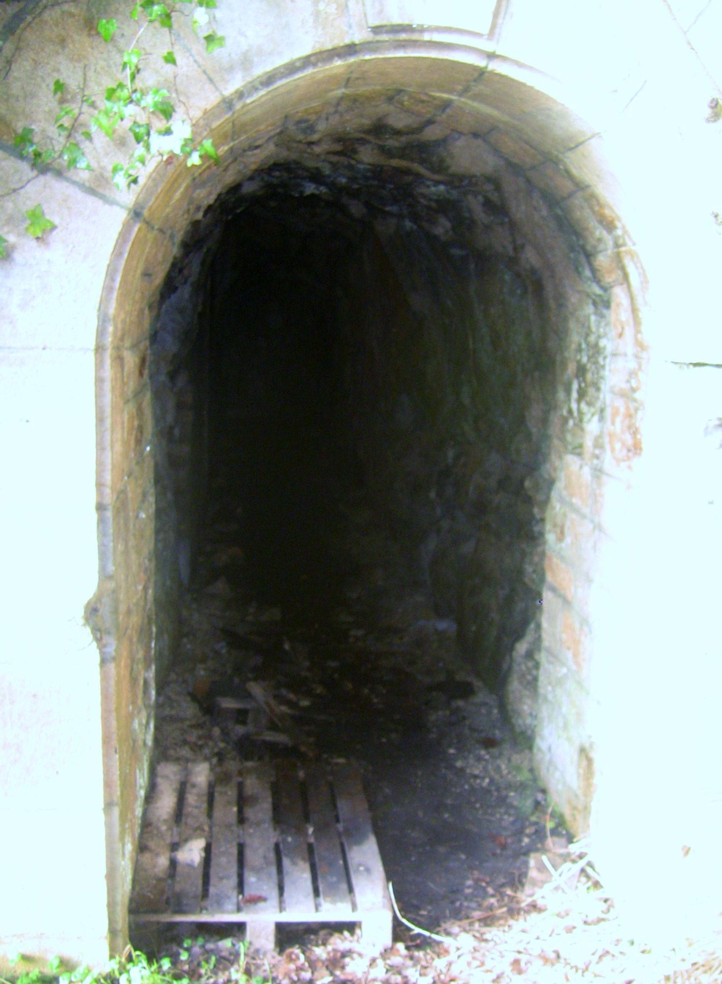 Couloir de l'entrée droite du magasin annexe du fort de Planoise, à Besançon (Doubs, France).